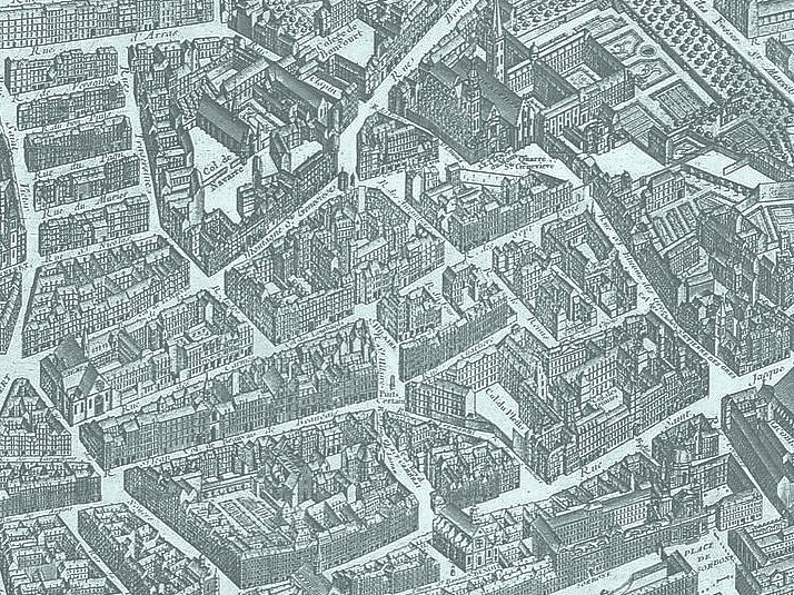 Plan de Turgit, Quartier latin et Clos Bruneau, Montagne Sainte Geneviève, avec entre autres : le Puits Certain, la rue des Sept voies, les rue Saint Hilaire,La rue des Carmes, la Rue Saint Jean de Beauvais, la rue Saint Jacques etc...